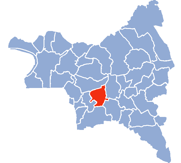 Auteur Hervé SUAUDEAU Licensing Catégorie:Cartes de Seine-saint-Denis Catégorie:Noisy-le-Sec